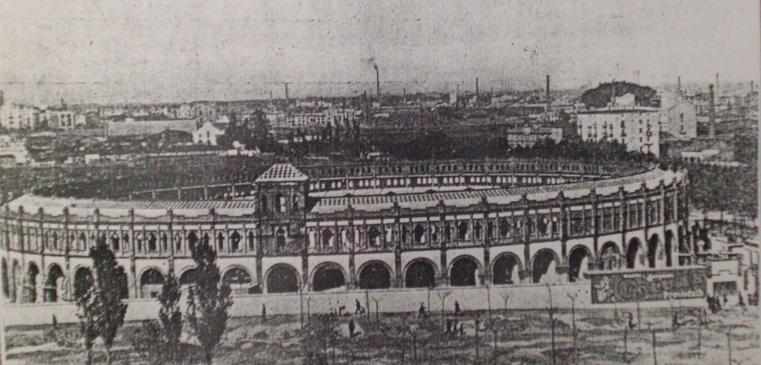 Plaça de toros "el Sport", posteriorment modificada i anomenada "Monumental" (Barcelona-Catalunya), obra de Manuel Raspall 1909 (desapareguda)